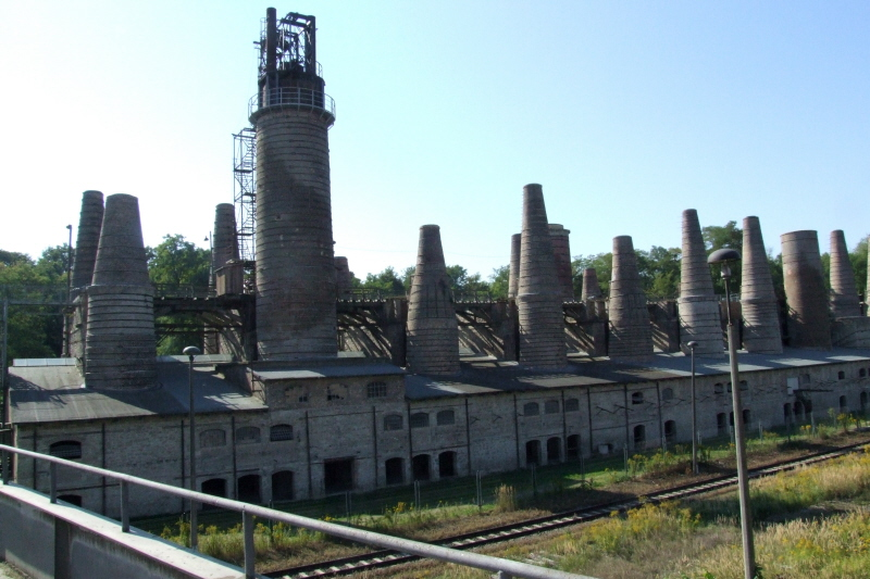 Museumsbark Rüdersdorf: Schachtofenbatterie Fotograf: Harald Rossa Datum: 3. Oktober 2006 Höher aufgelöste Version ist verfügbar